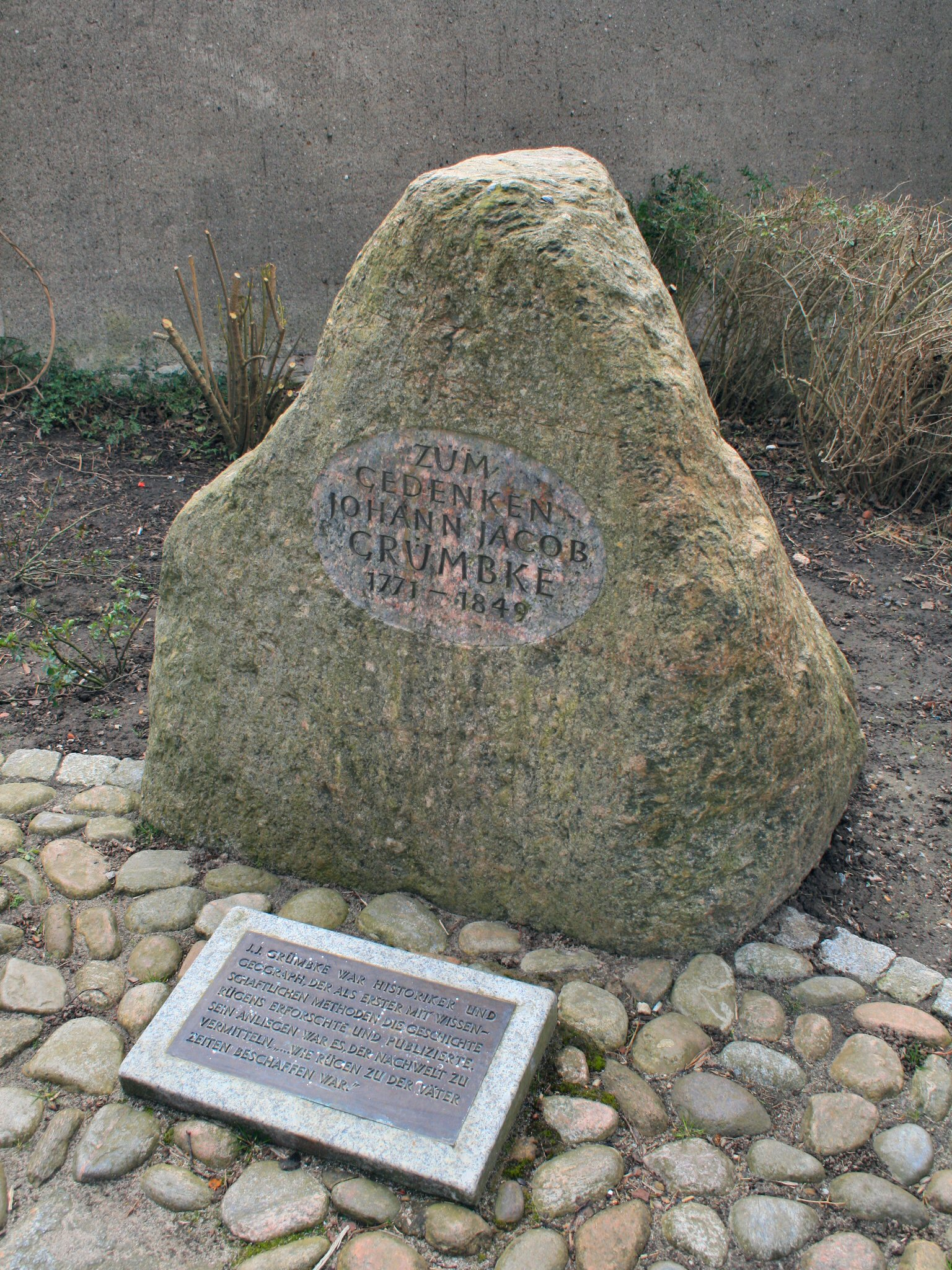 Gedenkstein für den Rügener Heimatforscher Johann Jacob Grümbke (1771–1849) in Bergen auf Rügen (Ecke Kirchstraße/Billrothstraße, gegenüber dem Portal der Marienkirche und ca. 75 Meter von dem Ort entfernt, an dem er die letzten 30 Jahre seines Lebens wohnte)